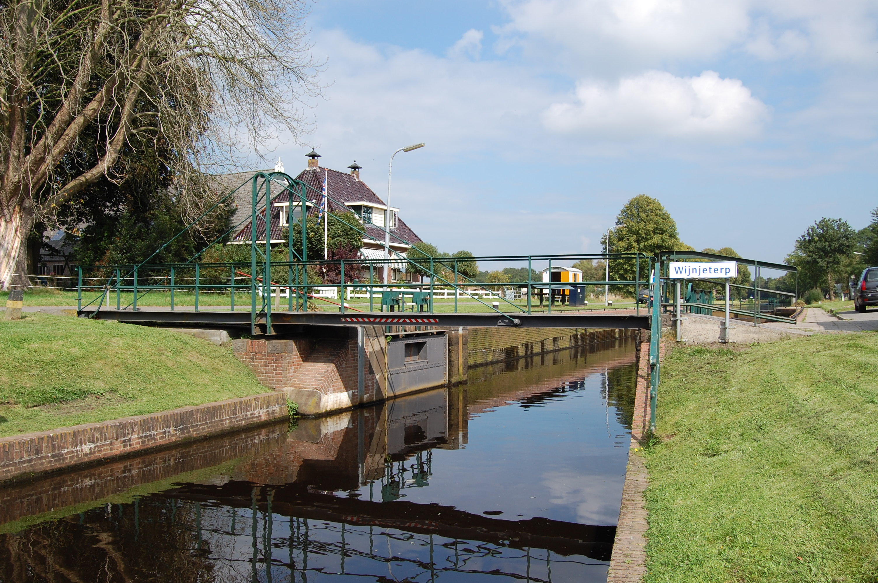 De draaibrug van het Wijnjeterpverlaat in de Opsterlandse-Compagnonsvaart.